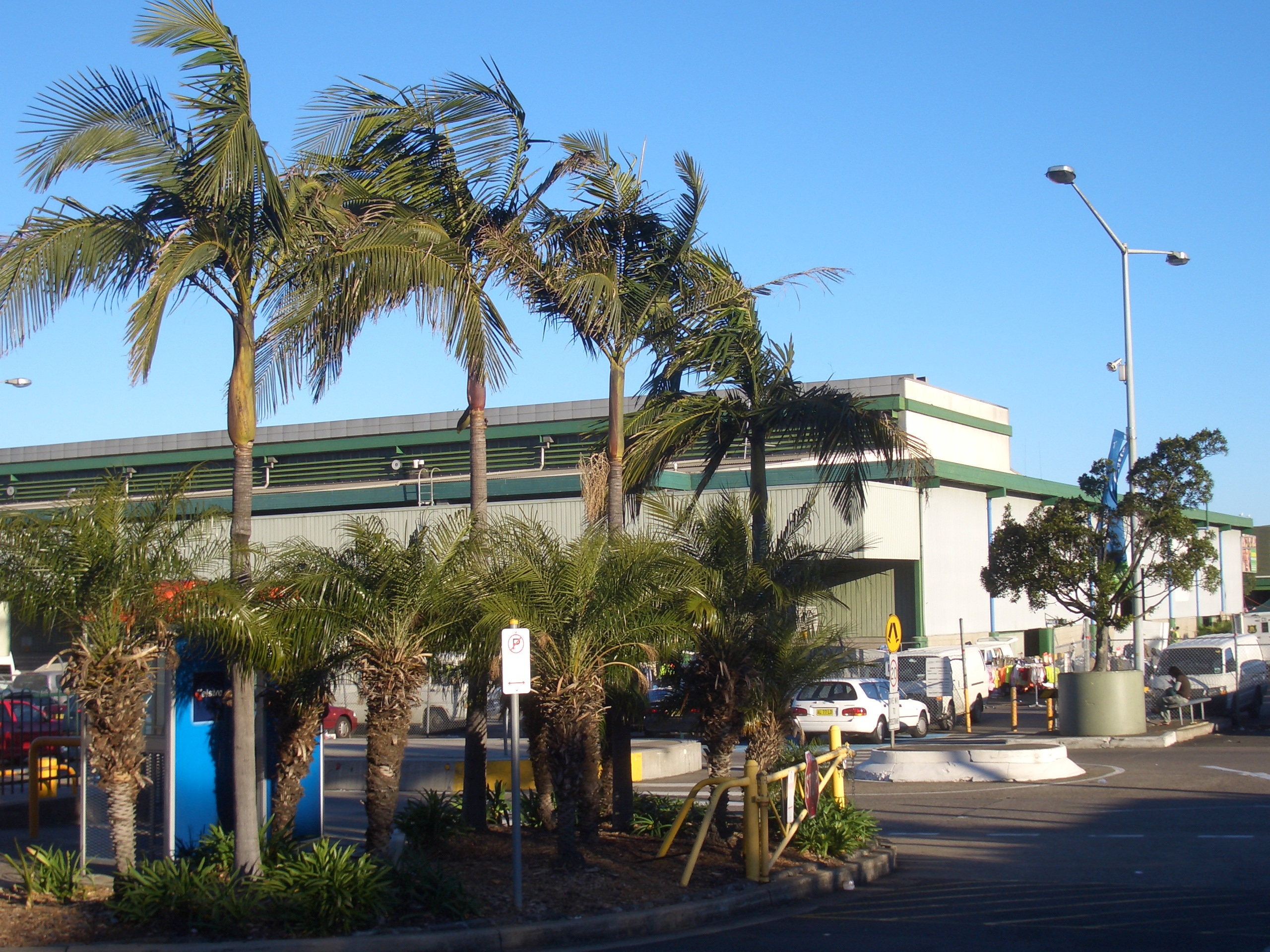 Flemington Markets, Paddy's Markets